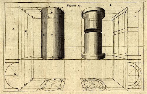 Ilustração em Perspectiva Pictorum et Architectorum